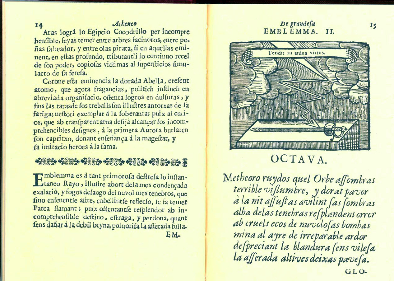 Text, emblem and poem from Josep Romaguera's 1681 Atheneo de Grandesa (Barcelona: Joan Jolis, 1681); Facsimile: Barcelona, Lletra Menuda, 1980. pp.14-15.